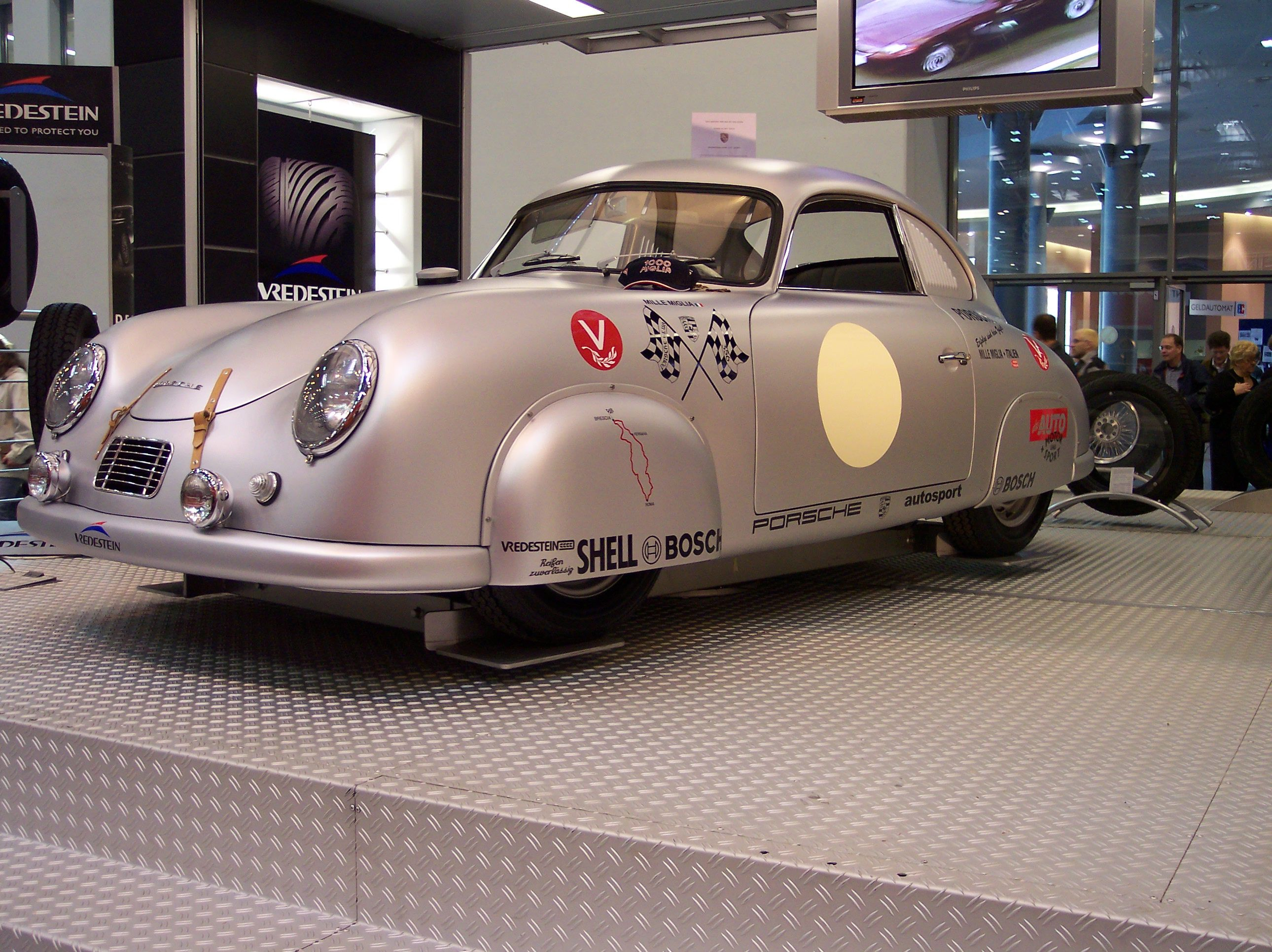 Porsche 356 Mille Miglia